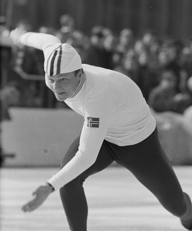 Olympische Spelen Grenoble. Roar Grønvold